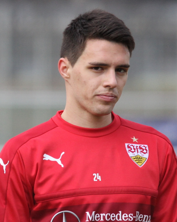 Josip Brekalo beim VfB-Training. Aufgenommen von